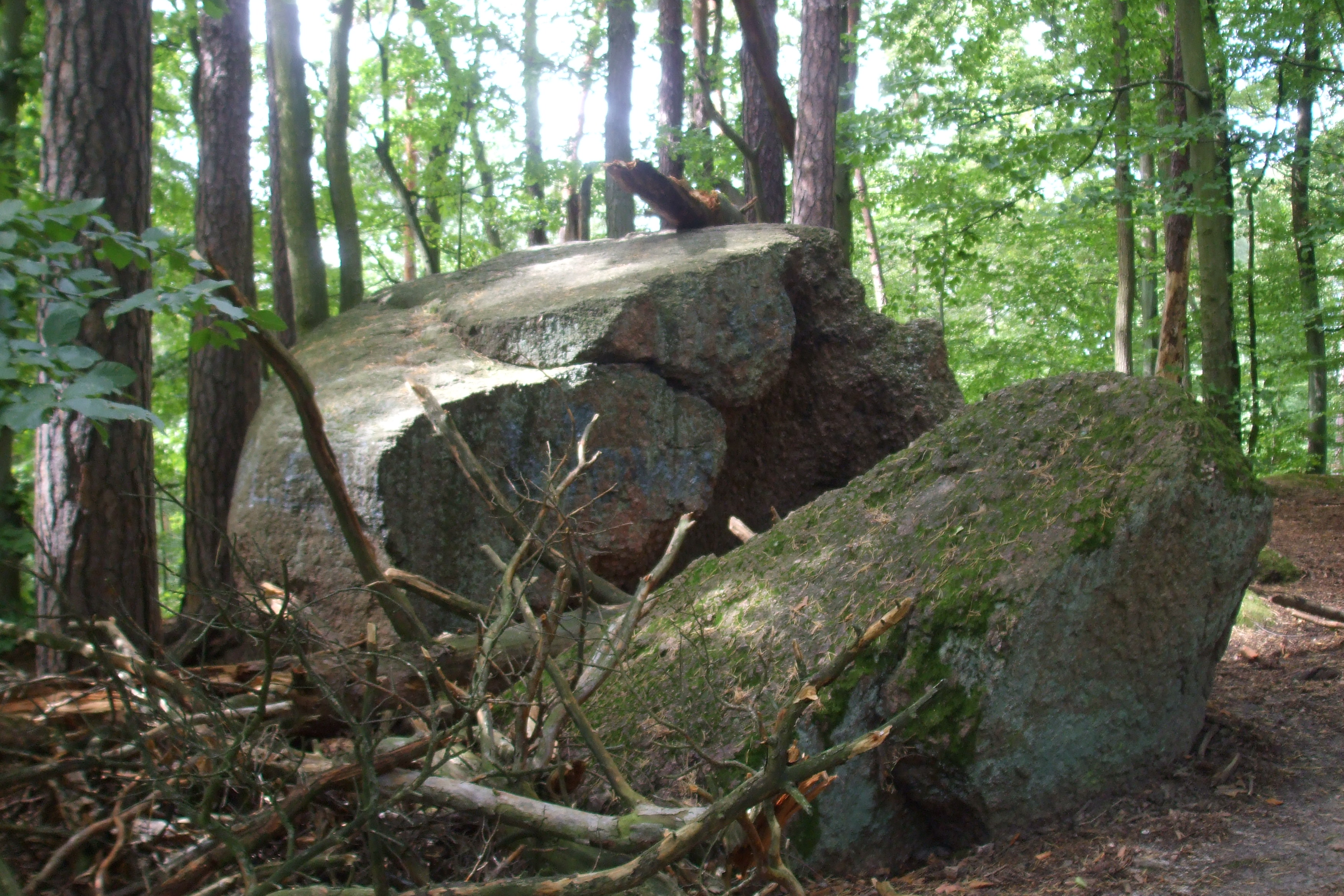 Diabelski kamień, Dolina Radości w Gdańsku, Poland.